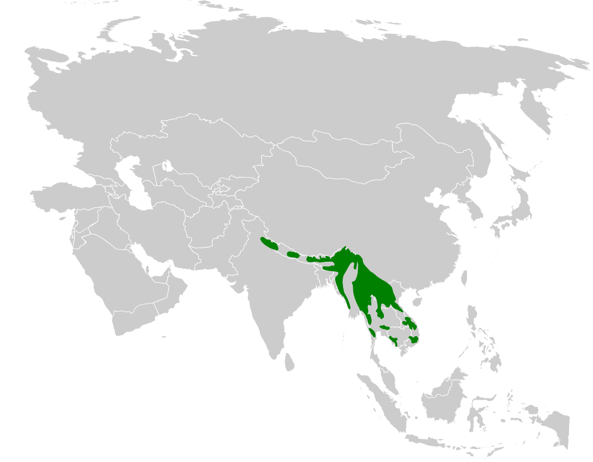 Hemixos flavala distribution map, based on